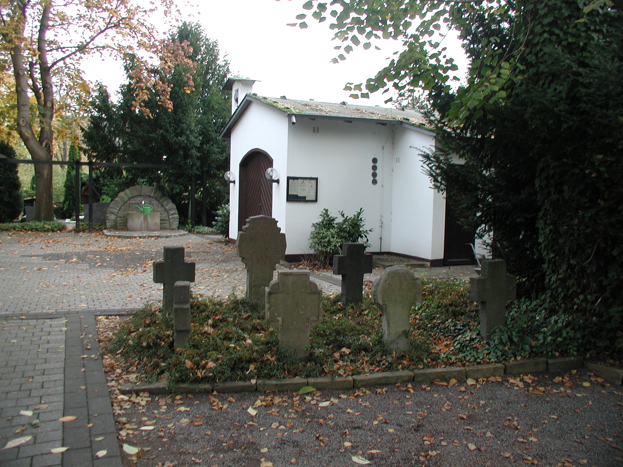 Hürth-Stotzheim, Grabsteine der Gutshofbesitzer